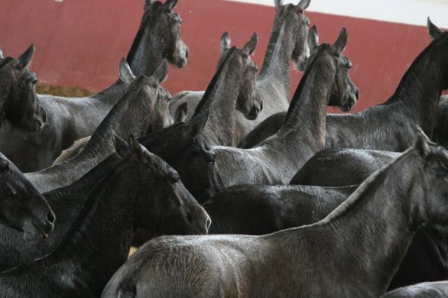 Jeunes PRE